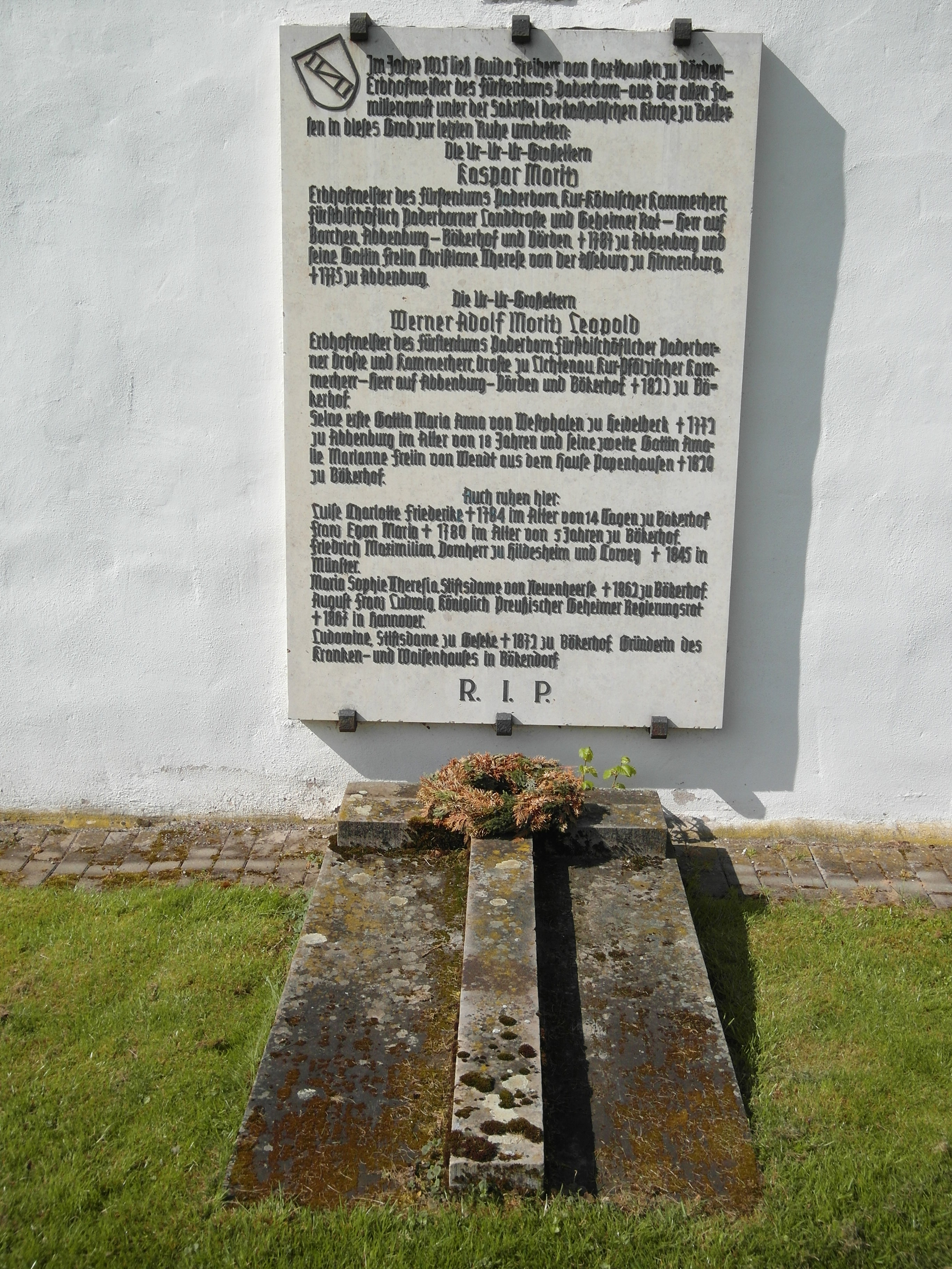 Dieses Foto zeigt das Grab der Familie von Haxthausen an der Kirchwand der Kirche St. Meinolf in Bellersen.